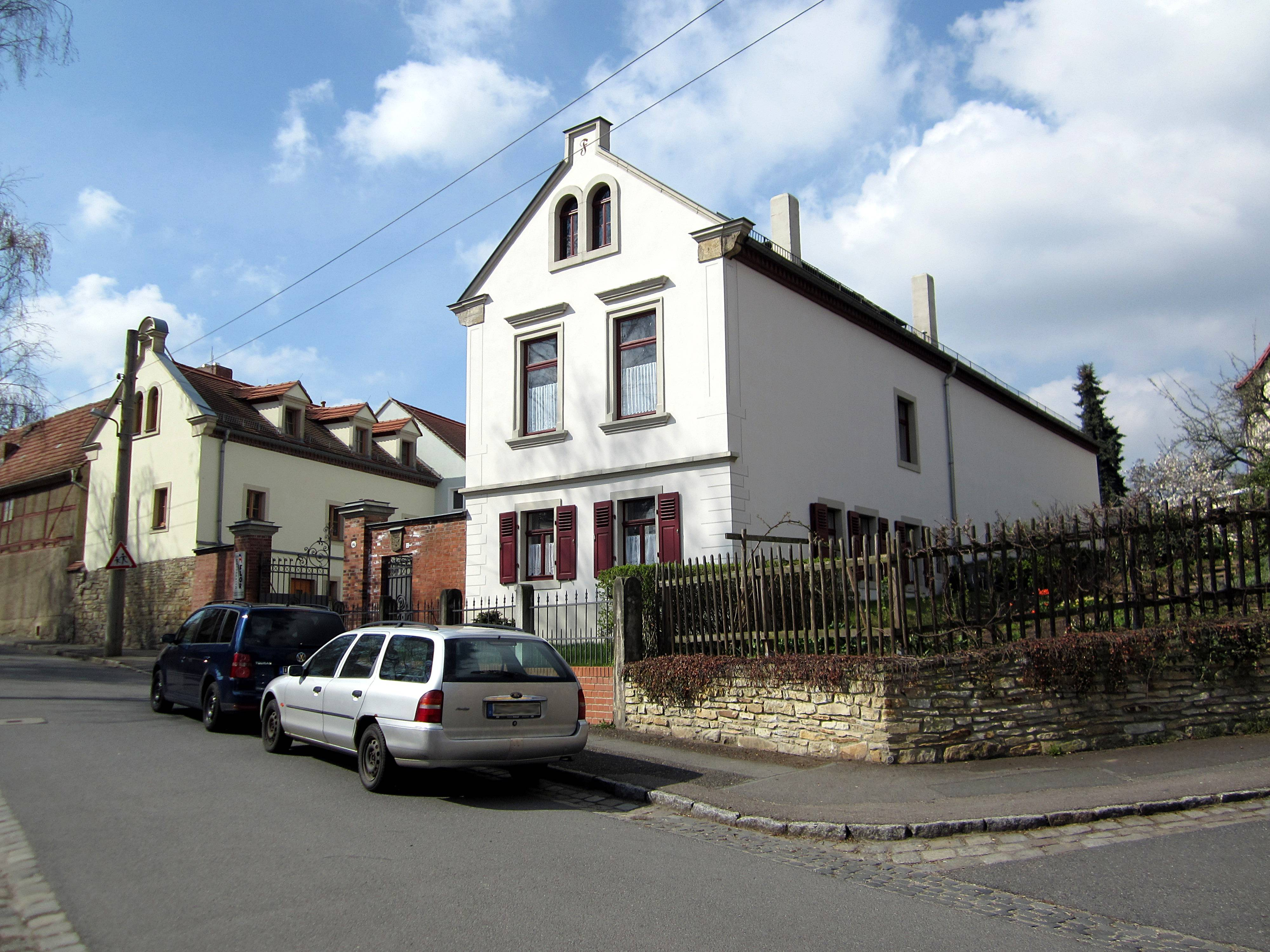 Wohnstallhaus mit Toranlage eines ehem. Bauernhofes, Altomsewitz 16 und 16a